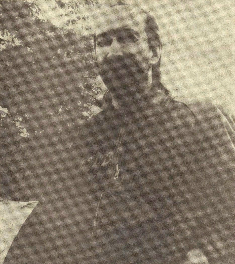 Gitarzysta i kompozytor Marek Jackowski (1946-2013), założyciel zespołu Maanam.